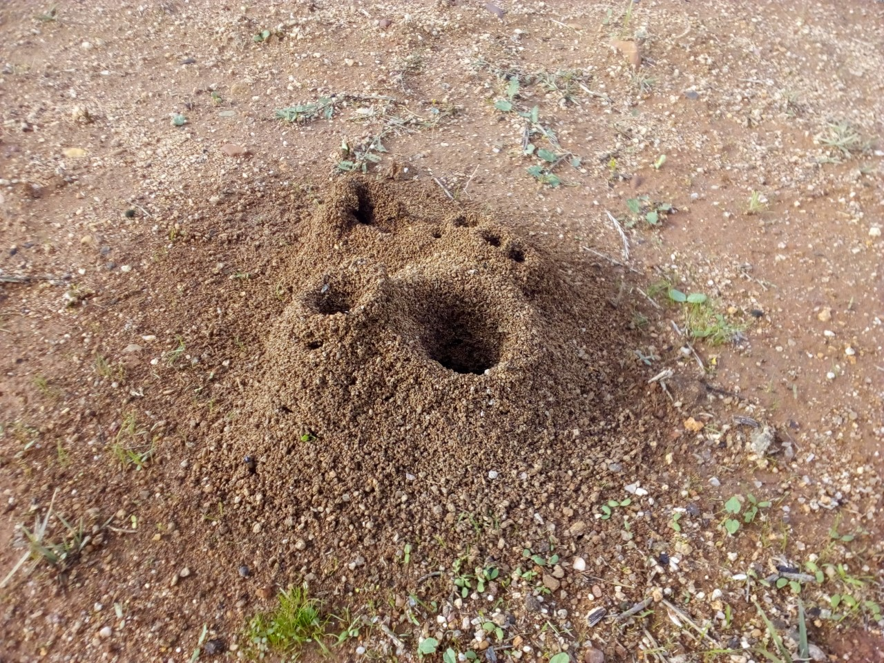 hormiguero